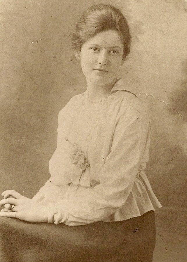 Thérèse Lemoine-Lagron en 1912